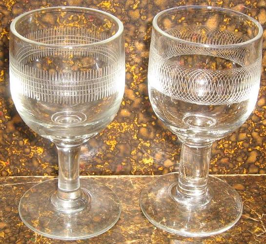 Guillocherade glas, ca 1900